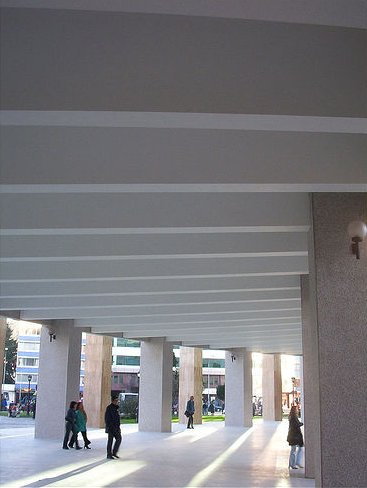 Interior de los Tribunales de Justicia de Concepción, Chile